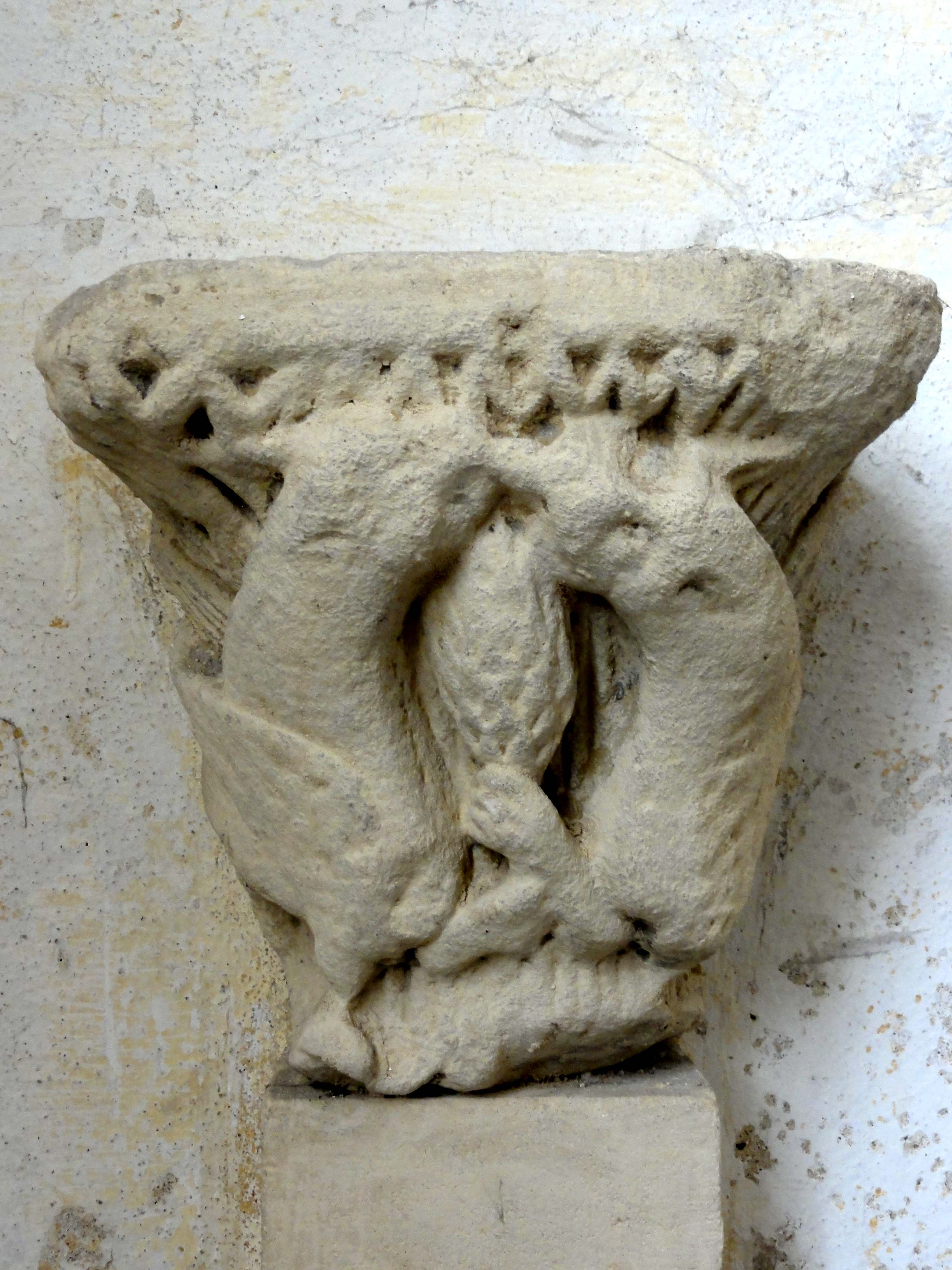 Chapiteau(x) de l'église - voir titre.